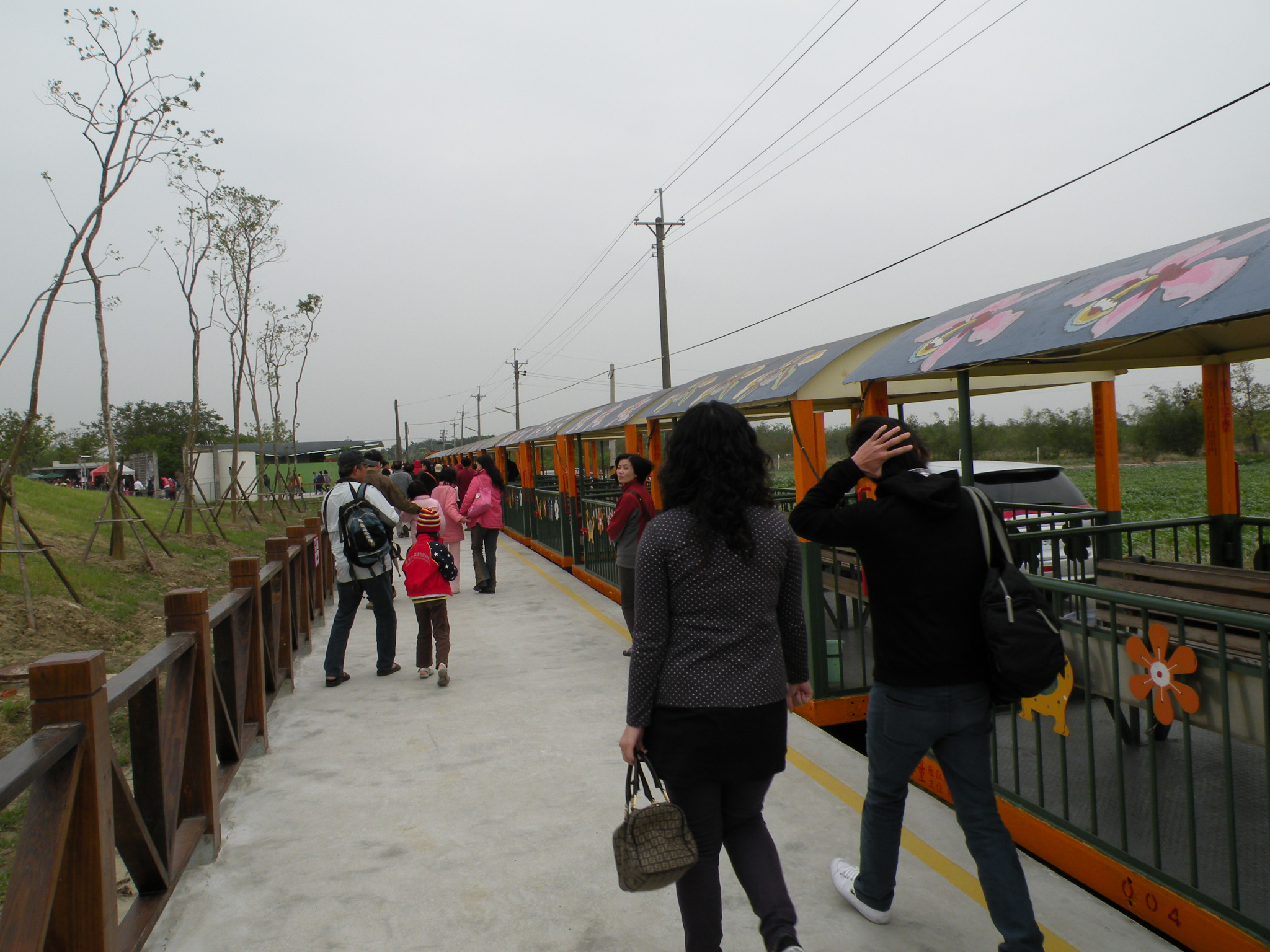 烏樹林糖廠國際蘭展月台